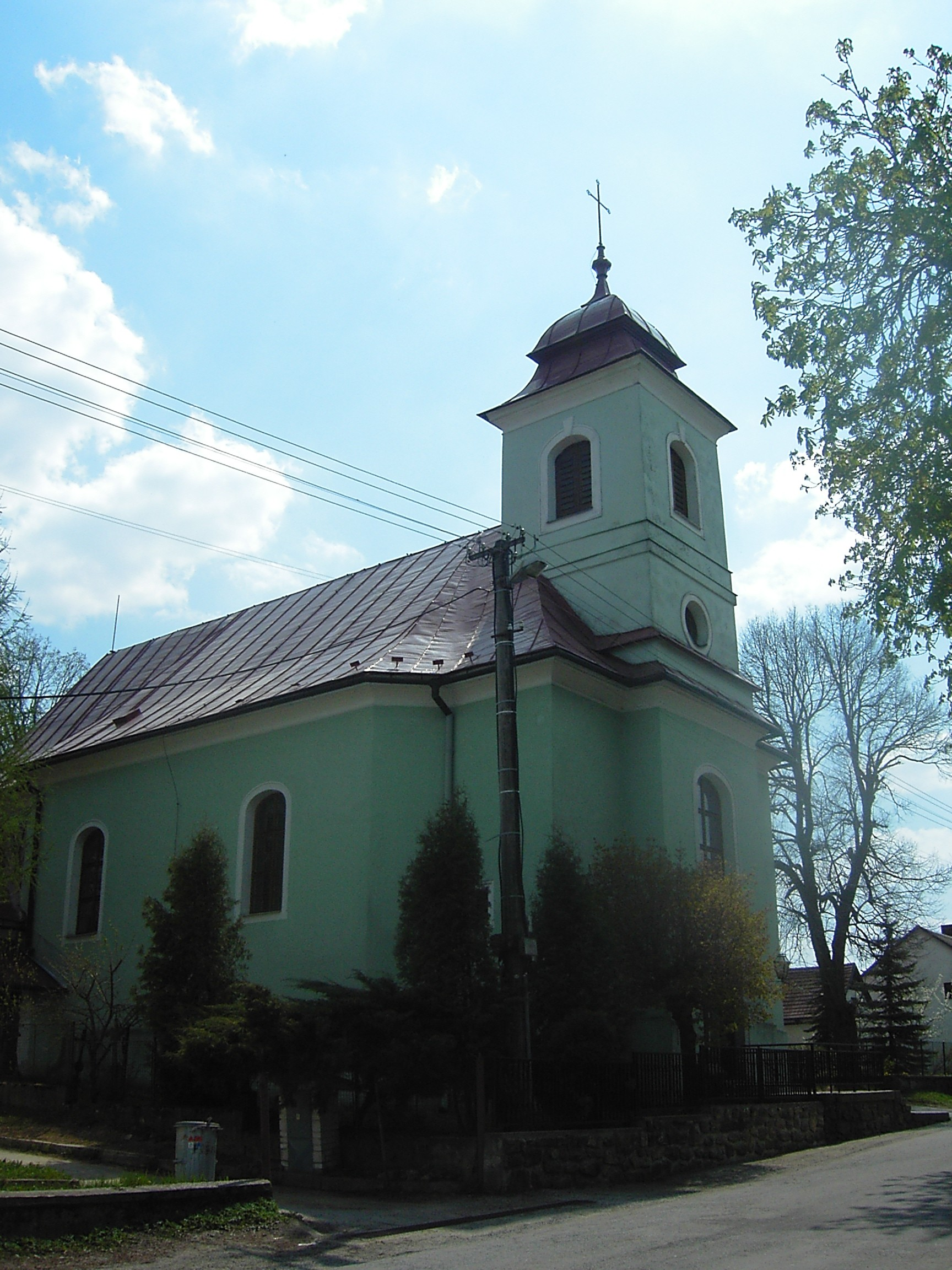 Fryšavský kostel sv. Matouše